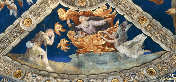 Ceiling Fresco Stanza di Eliodoro, Palazzi Pontifici, Vatican